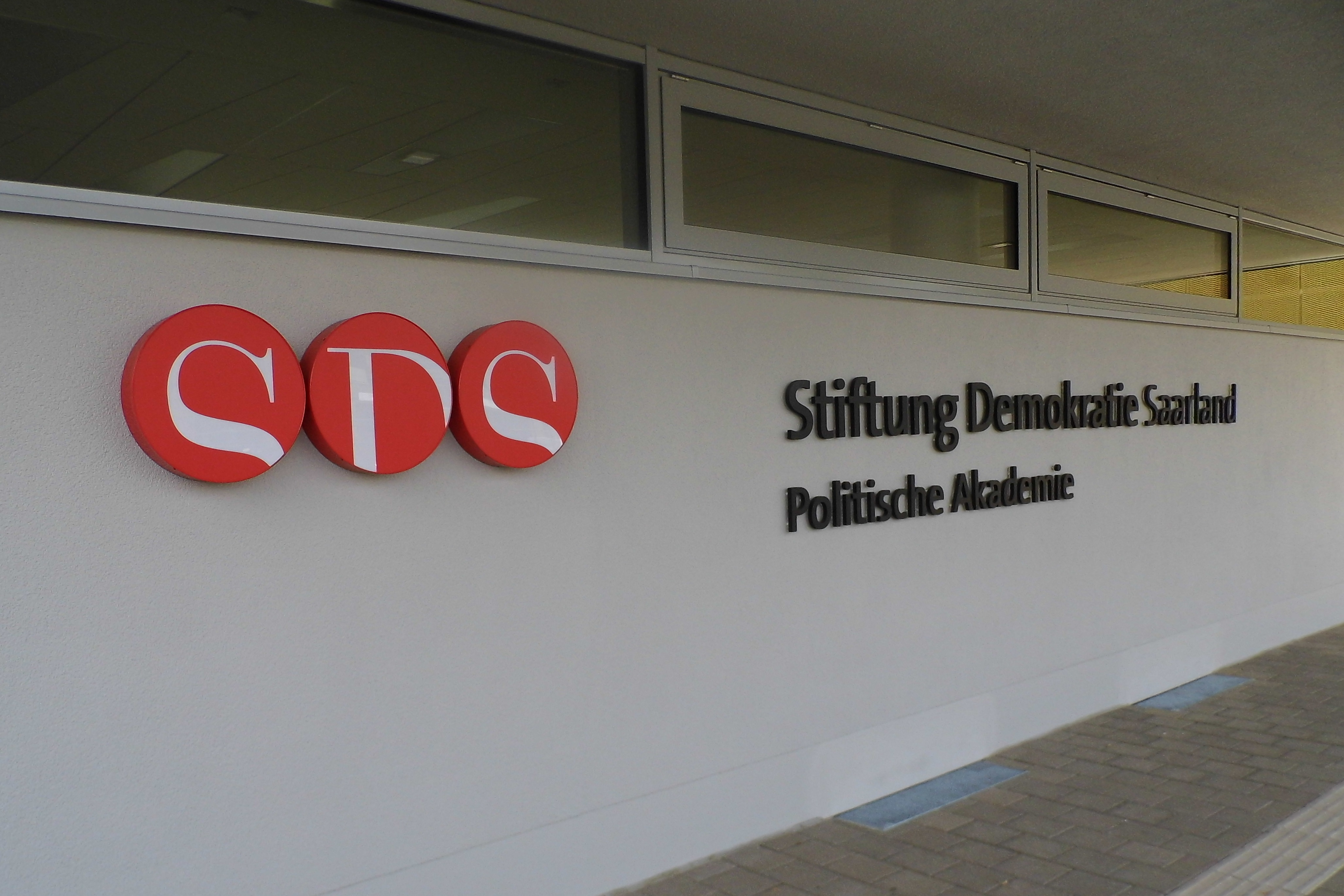 Politische Akademie der Stiftung Demokratie Saarland